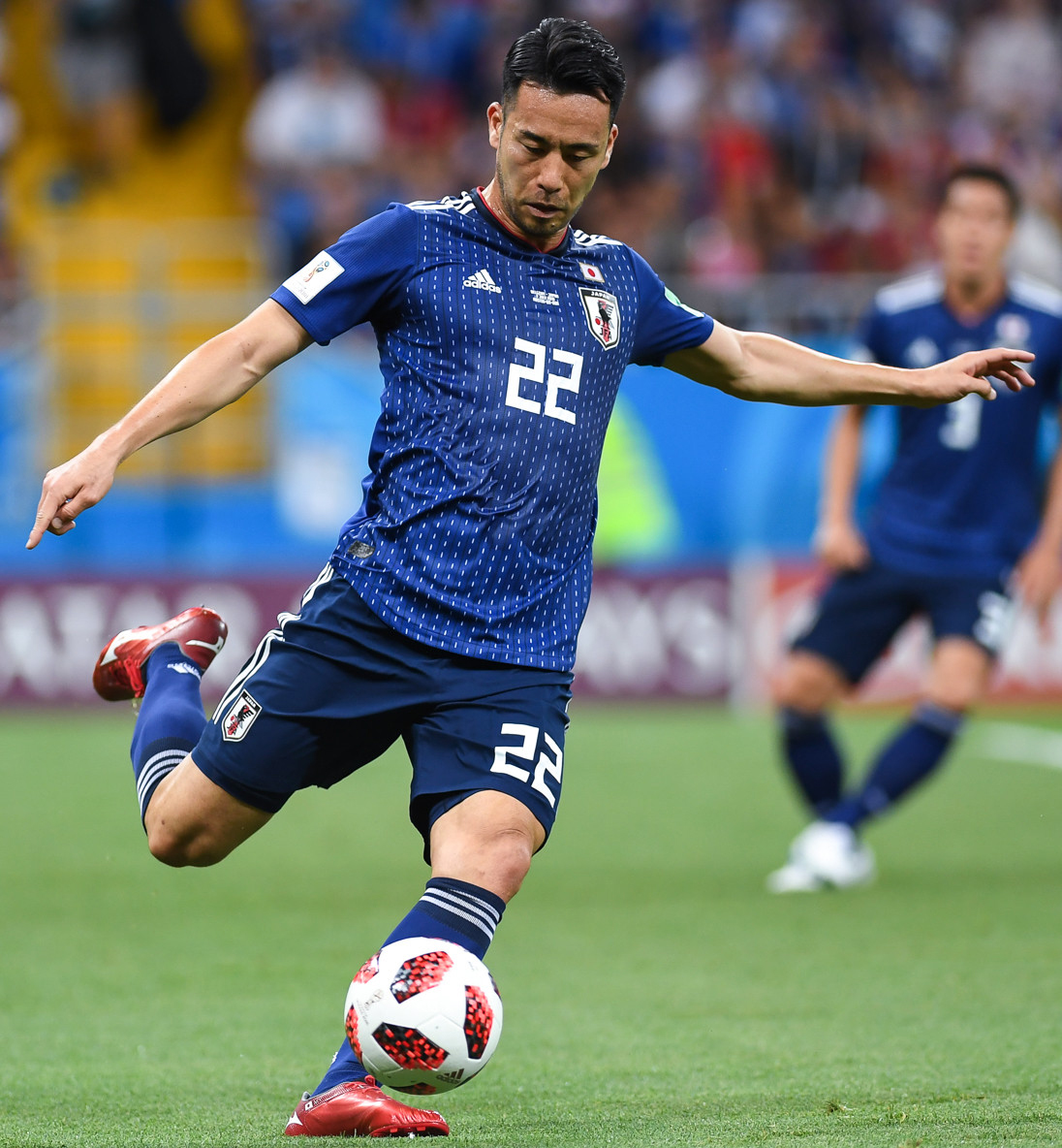 Потрясающий камбэк сборной Бельгии в матче с Японией